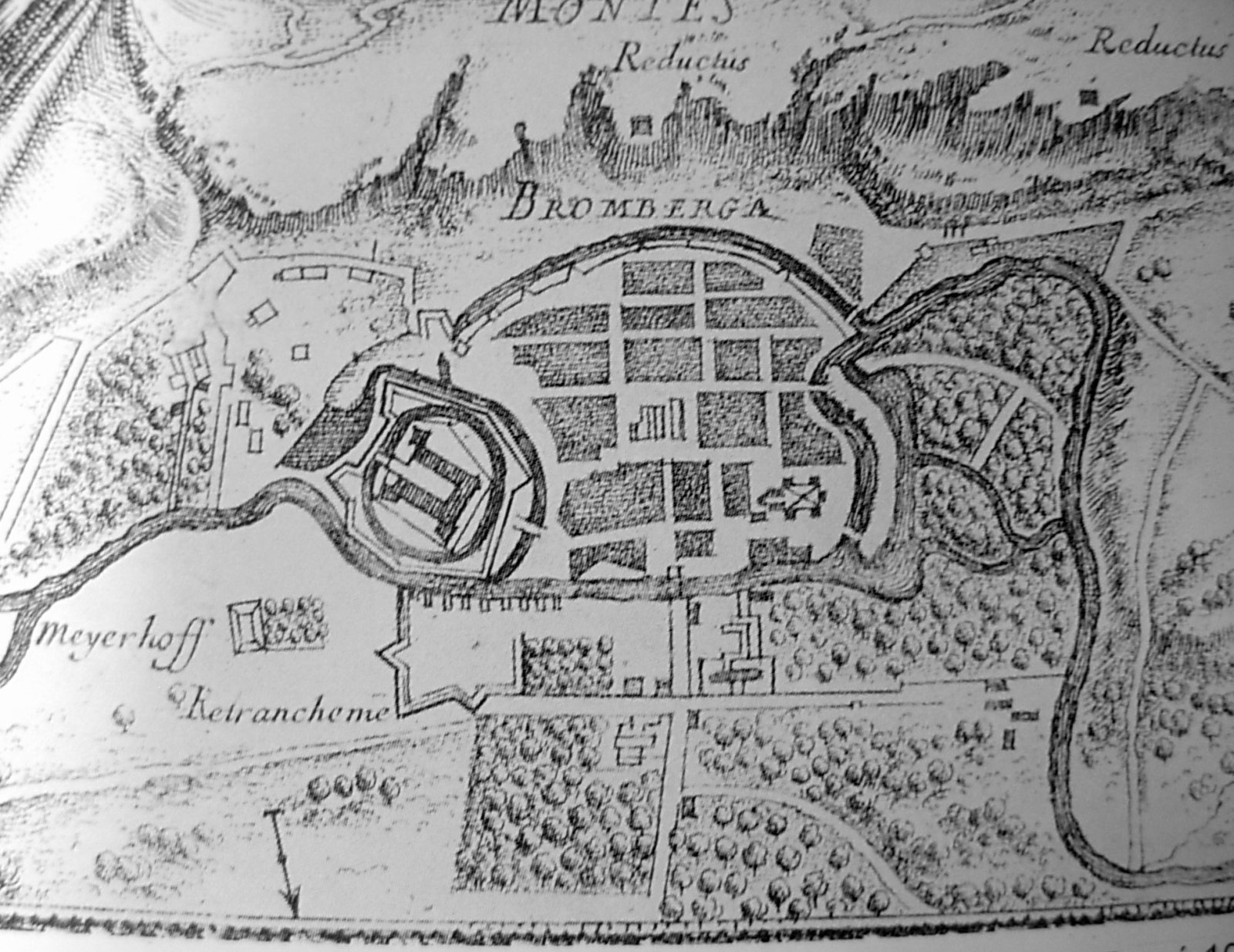 Plan Bydgoszczy z 1657 r. wykonany przez Erika Dahlberga, zamieszczony w dziele wydanym w 1696 r.